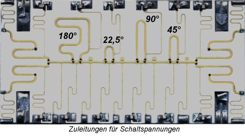 Phasenschieber mit durch PIN-Dioden zuschaltbare Umwegleitungen